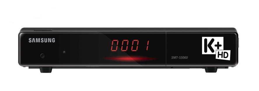 Thiết bị đầu thu HD thế hệ đầu của K+